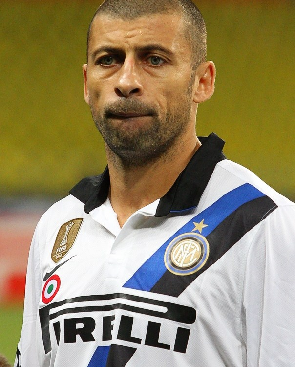 Walter Samuel FC Internazionale